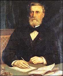 Hersart de Villemarque (1815-1895), poeta bretó.